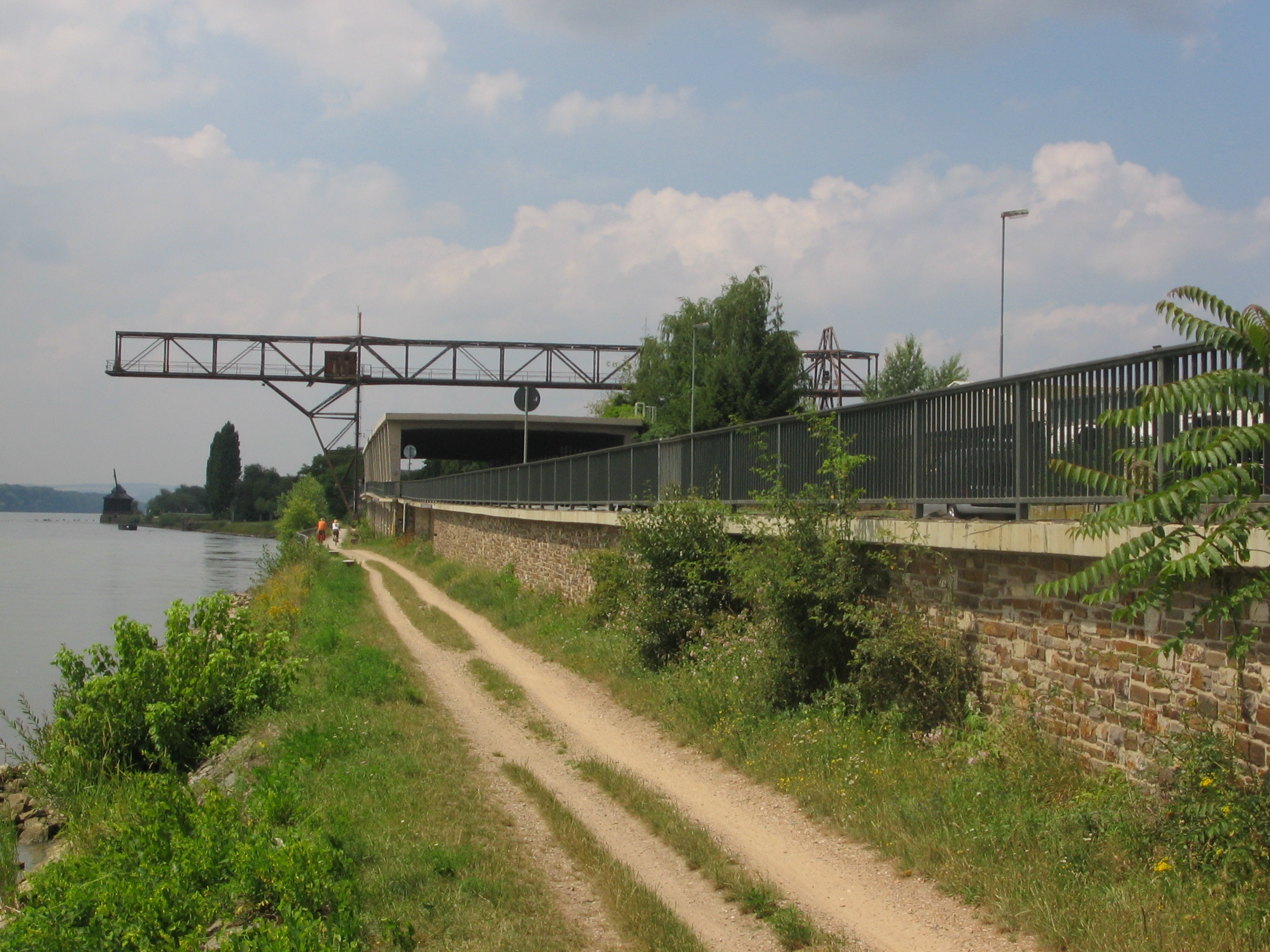 Blick vom Leinpfad am Ufer rheinabwärts auf Tunnel und Portalkran über der Bundesstraße 42, dahinter der historische Oestricher Kran